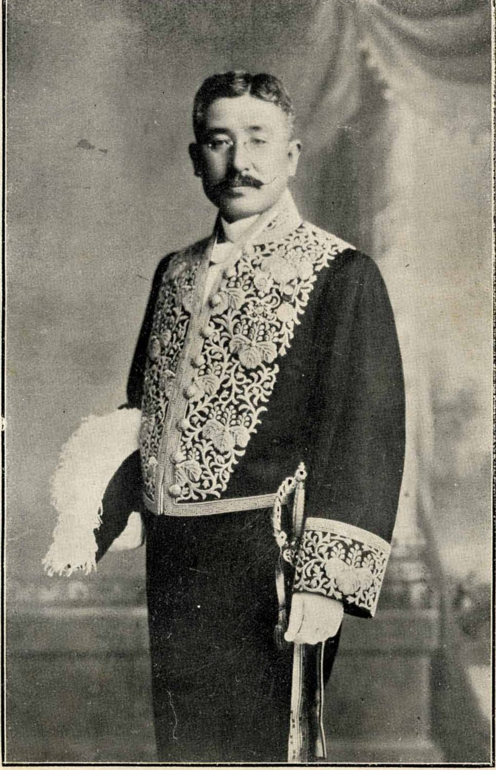 新元鹿之助